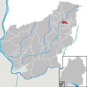 Tunau, Landkreis Lörrach, Baden-Württemberg